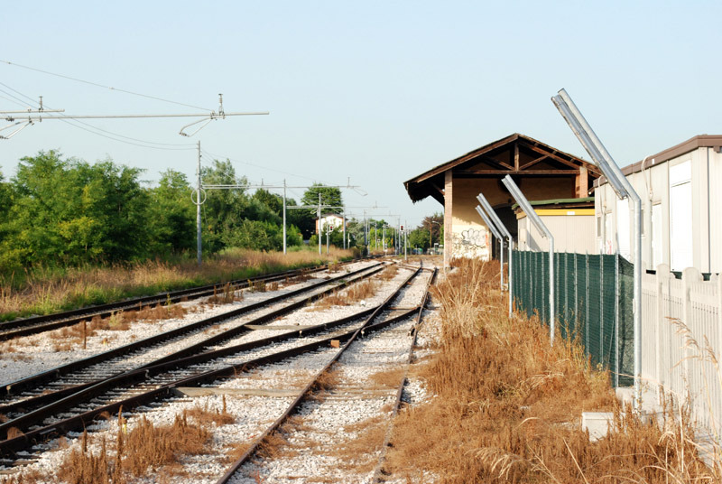 Oriago ST